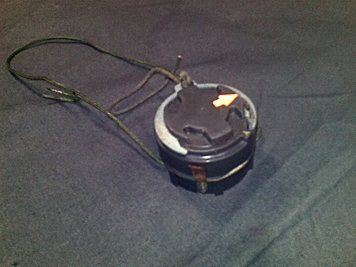 M14